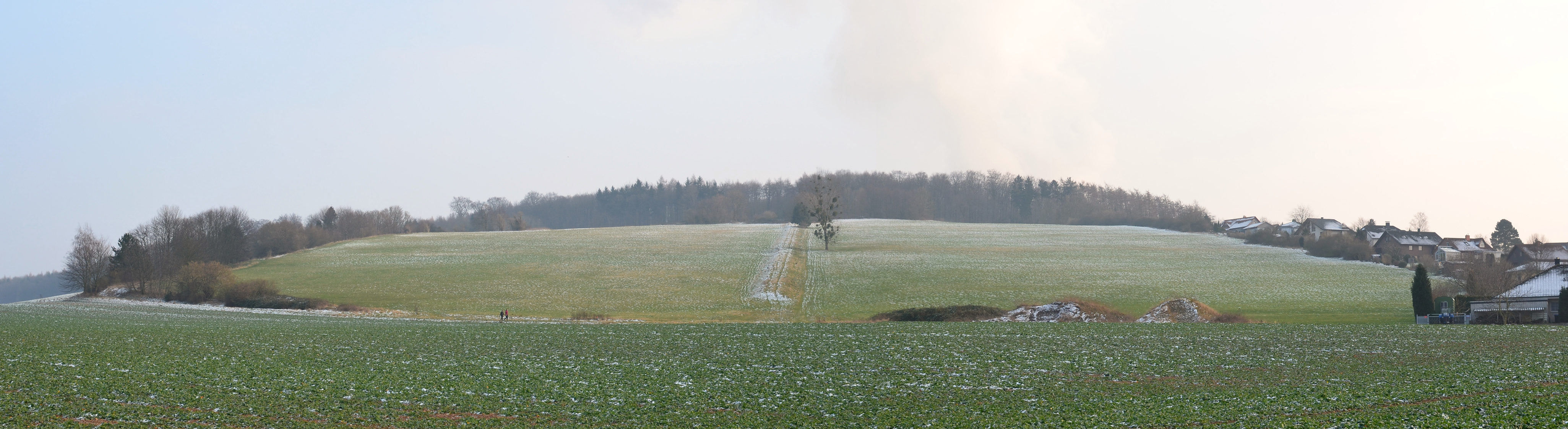 Früheres Reichserntedankfestgelände